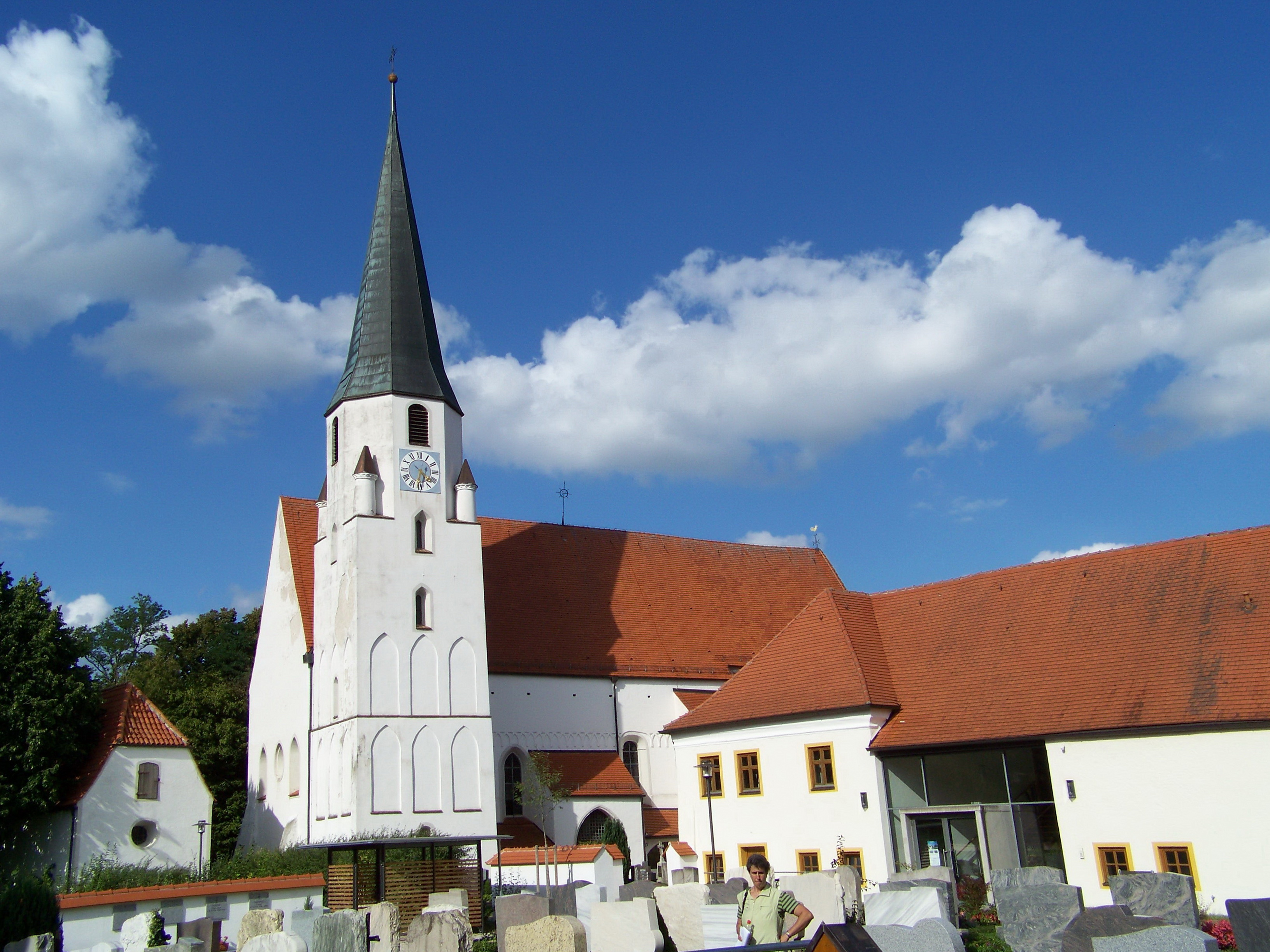 Katholische Pfarrkirche St. Peter und Paul, Wandpfeileranlage unter steilem Satteldach mit Südturm, Langhaus 13. Jahrhundert, Chor und Turm Mitte 15. Jahrhundert; mit Ausstattung; Friedhofmauer, 17./18. Jahrhundert; Seelenkapelle, kleiner massiver Bau mit Krüppelwalmdach, Ende 15. Jahrhundert; mit Ausstattung.